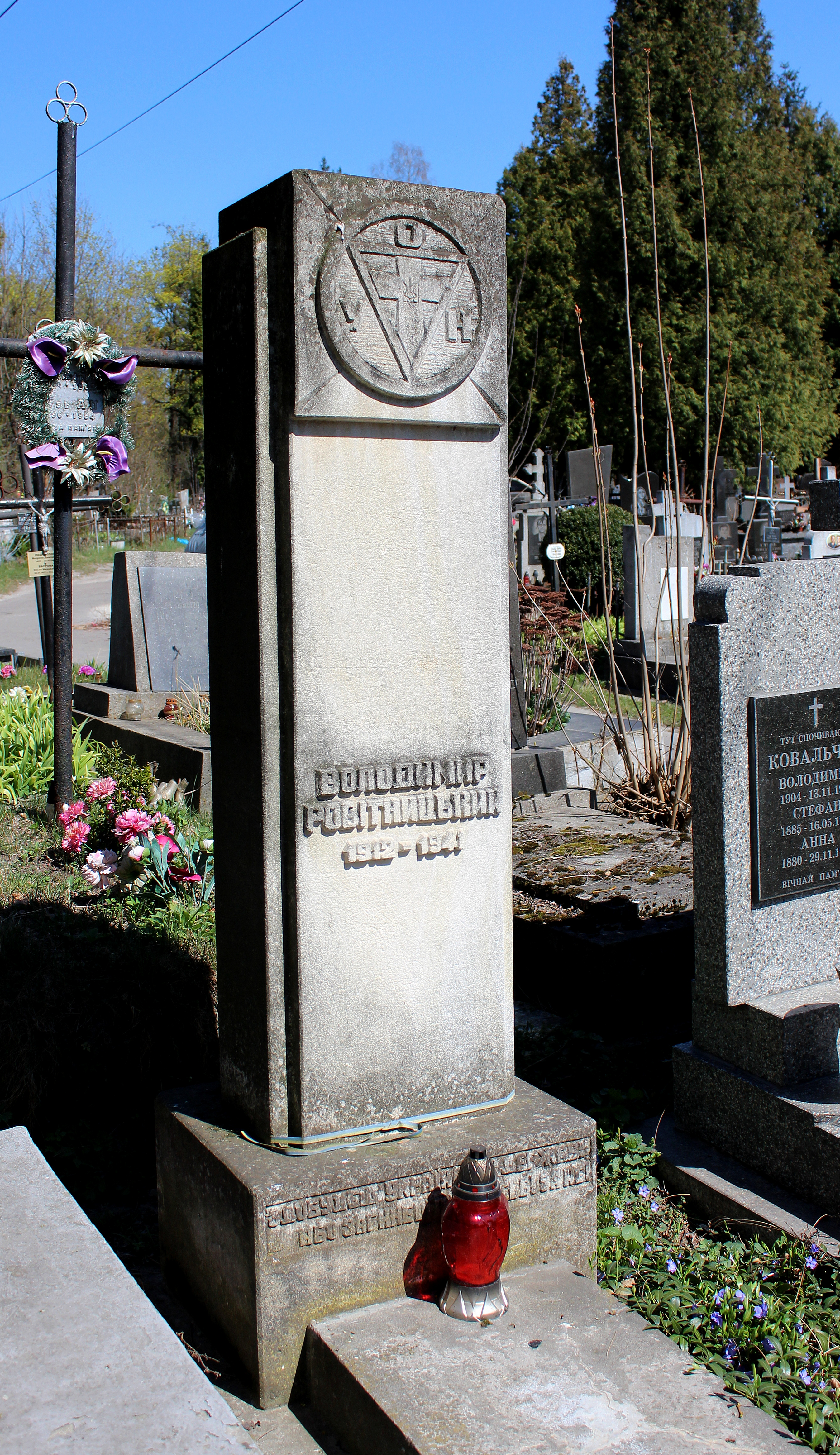 Надгробок на могилі В. Робітницького.Янівський цвинтар.